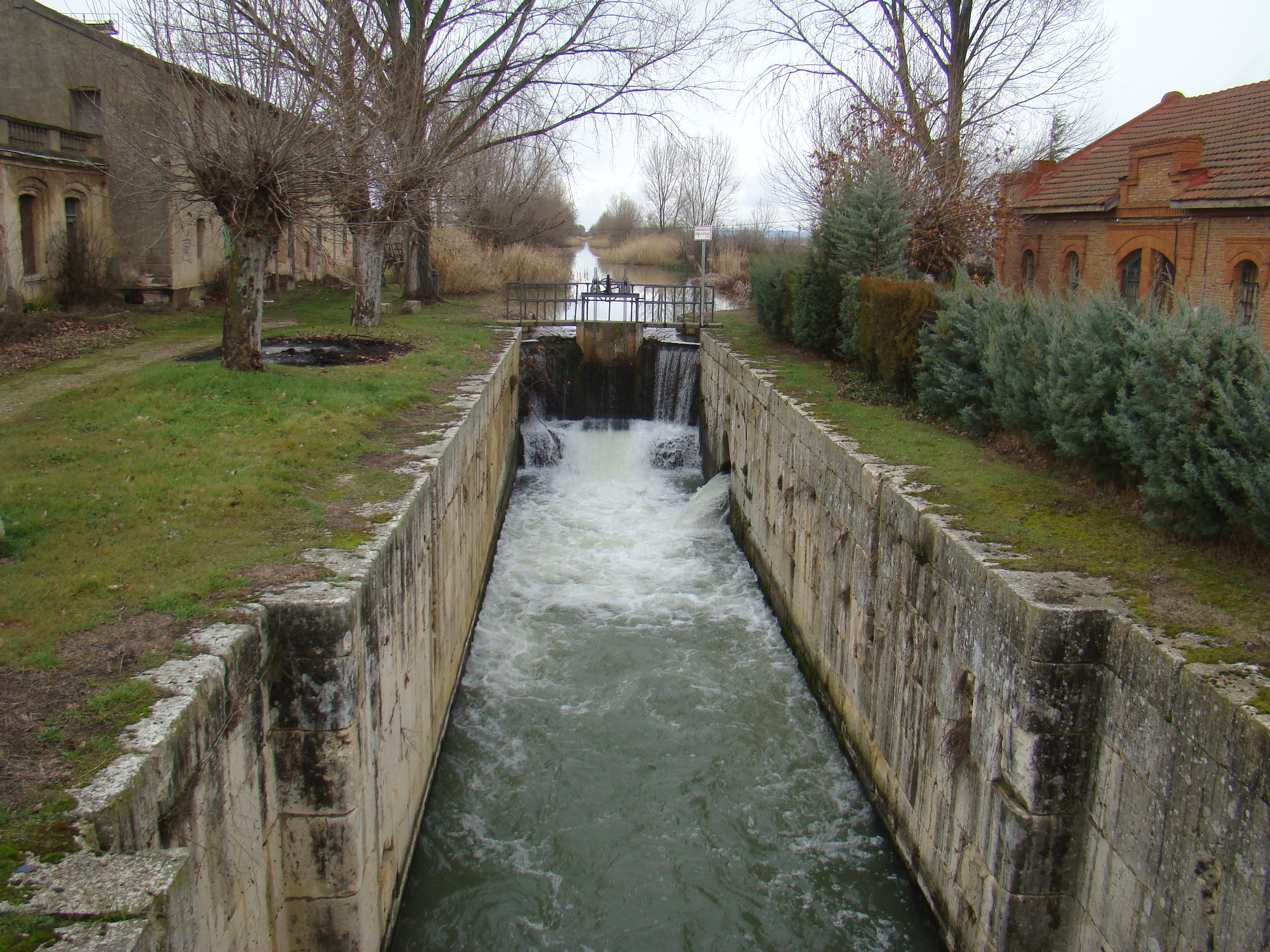 Esclusa nº 40 del Canal de Castilla en el término de Corcos-Aguilarejo, provincia de Valladolid, España.